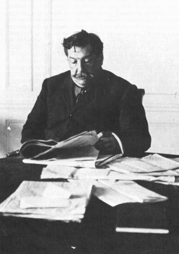 José Batlle y Ordóñez hacia 1900